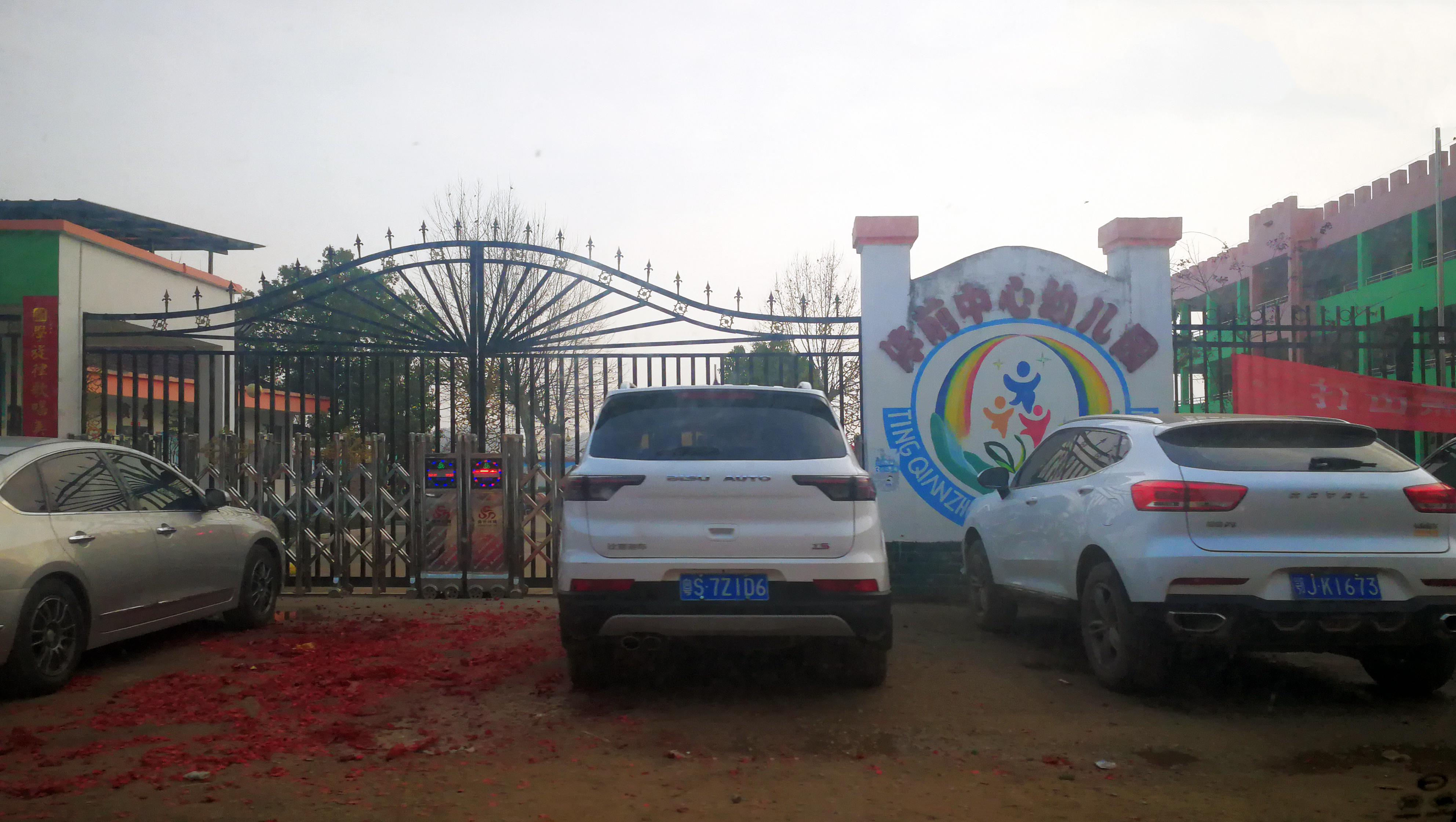 中文（中国大陆）: 湖北省黄梅县停前中心幼儿园